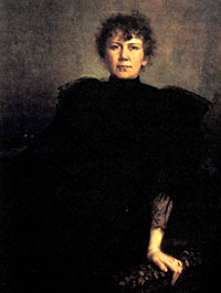 Мария Гажич. автопортрет. Национальный музей в Варшаве.